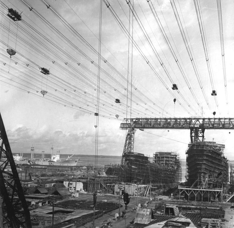 Warnemünde, Warnow-Werft, Trockendock Zentralbild Hesse-Mellahn 29.7.58 Warnow-Werft in Warnemünde Blick auf die Helling mit der Kabelkrananlage. Hier werden die Frachter der 10000 Tonnen-Serie hergestellt. Hinten links: Die zur Abnahme bereitgestellte "Dresden".